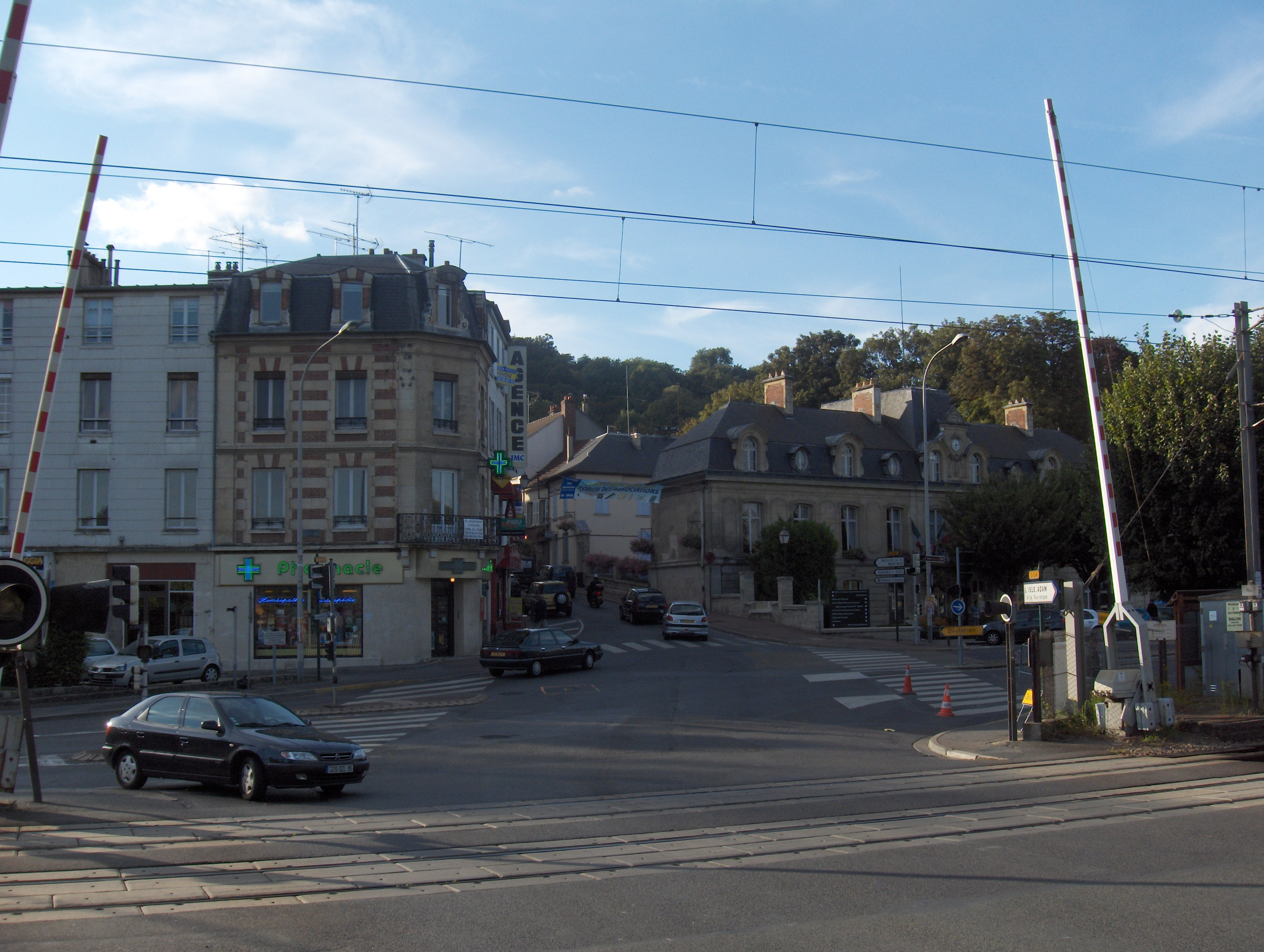 Entrée de Parmain, croisement D64 et D4